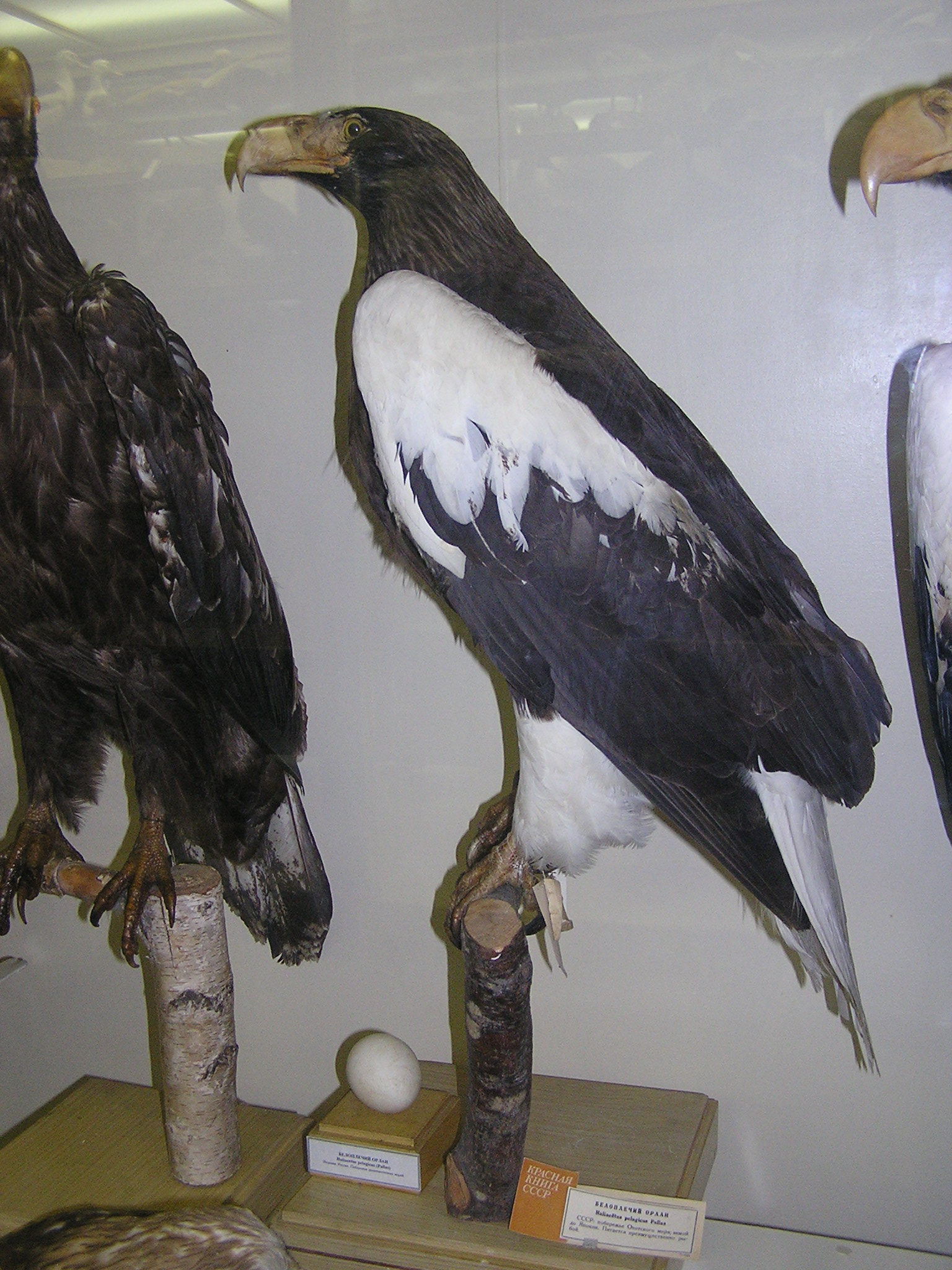 Зоологический музей в Санкт-Петербурге. Белоплечий орлан